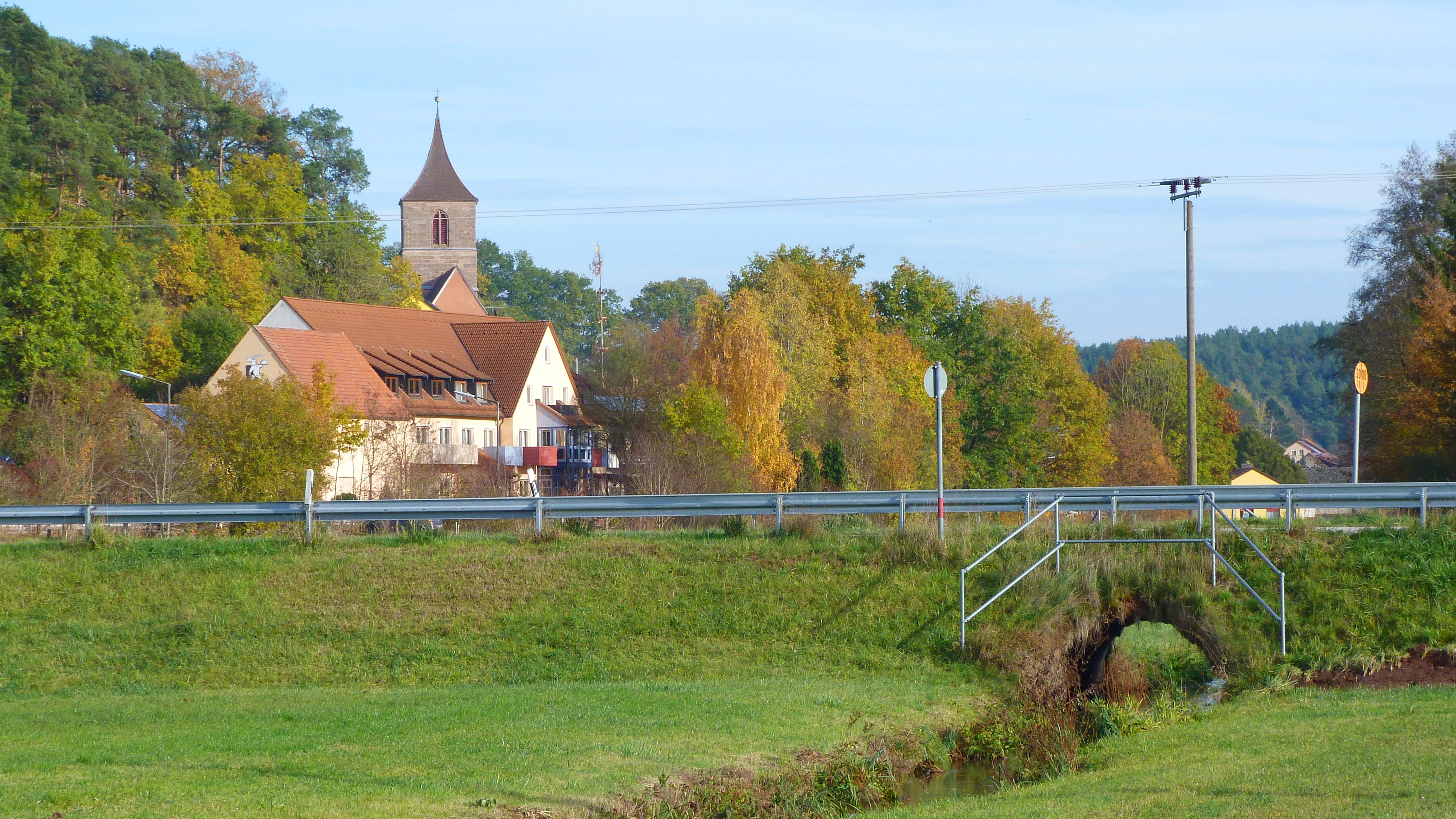 Veitsaurach mit St. Vitus